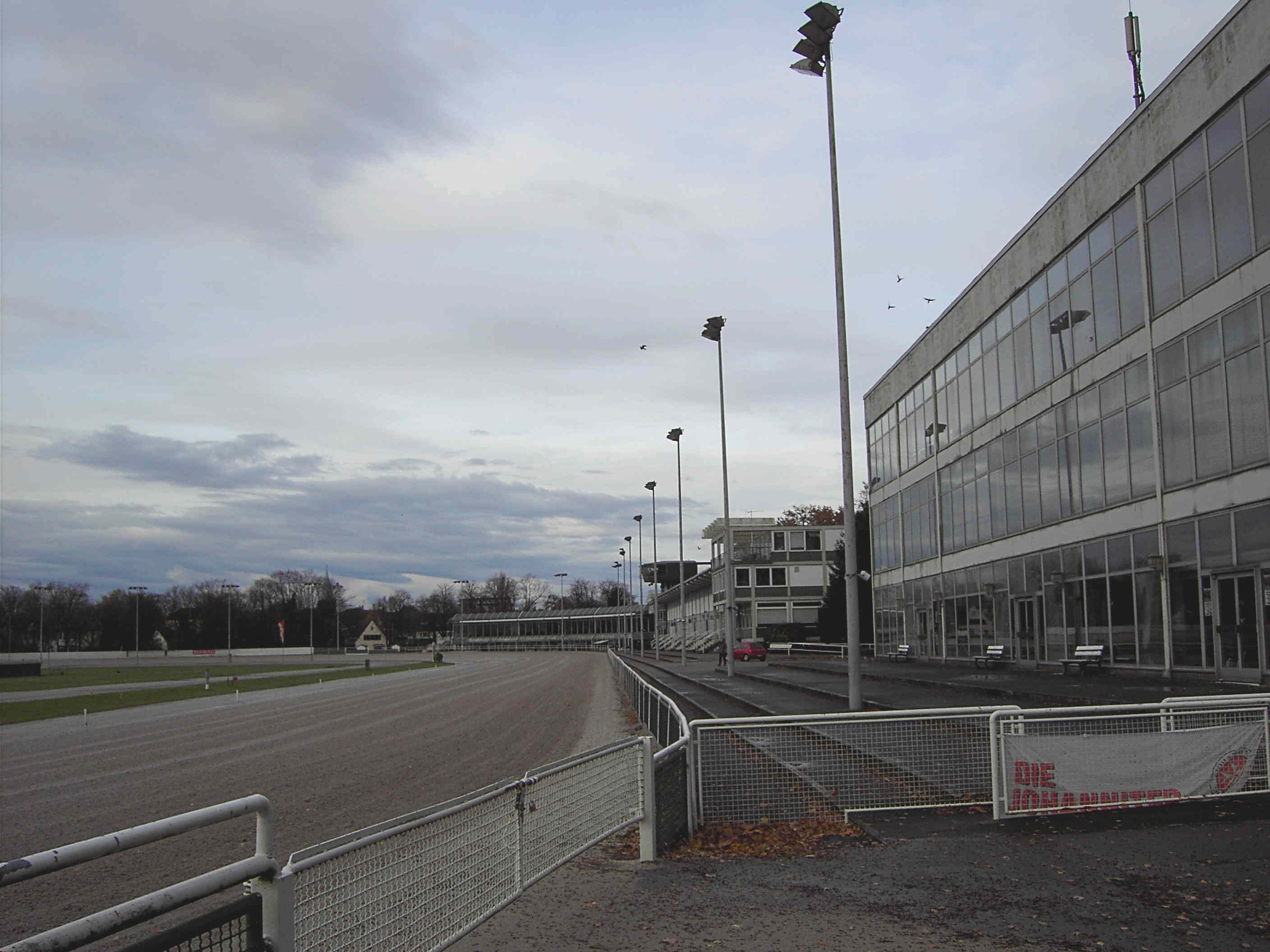 Trabrennbahn Dinslaken Tribünenhaus an der Ostseite